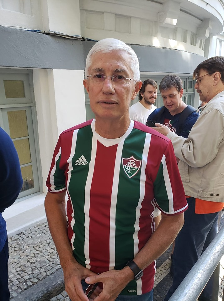 Pedro Antonio Ribeiro da Silva, principal responsável pela construção e nome do Centro de Treinamento do Fluminense Football Club durante a eleição para presidente do clube em 8 de junho de 2019 às 11 horas.